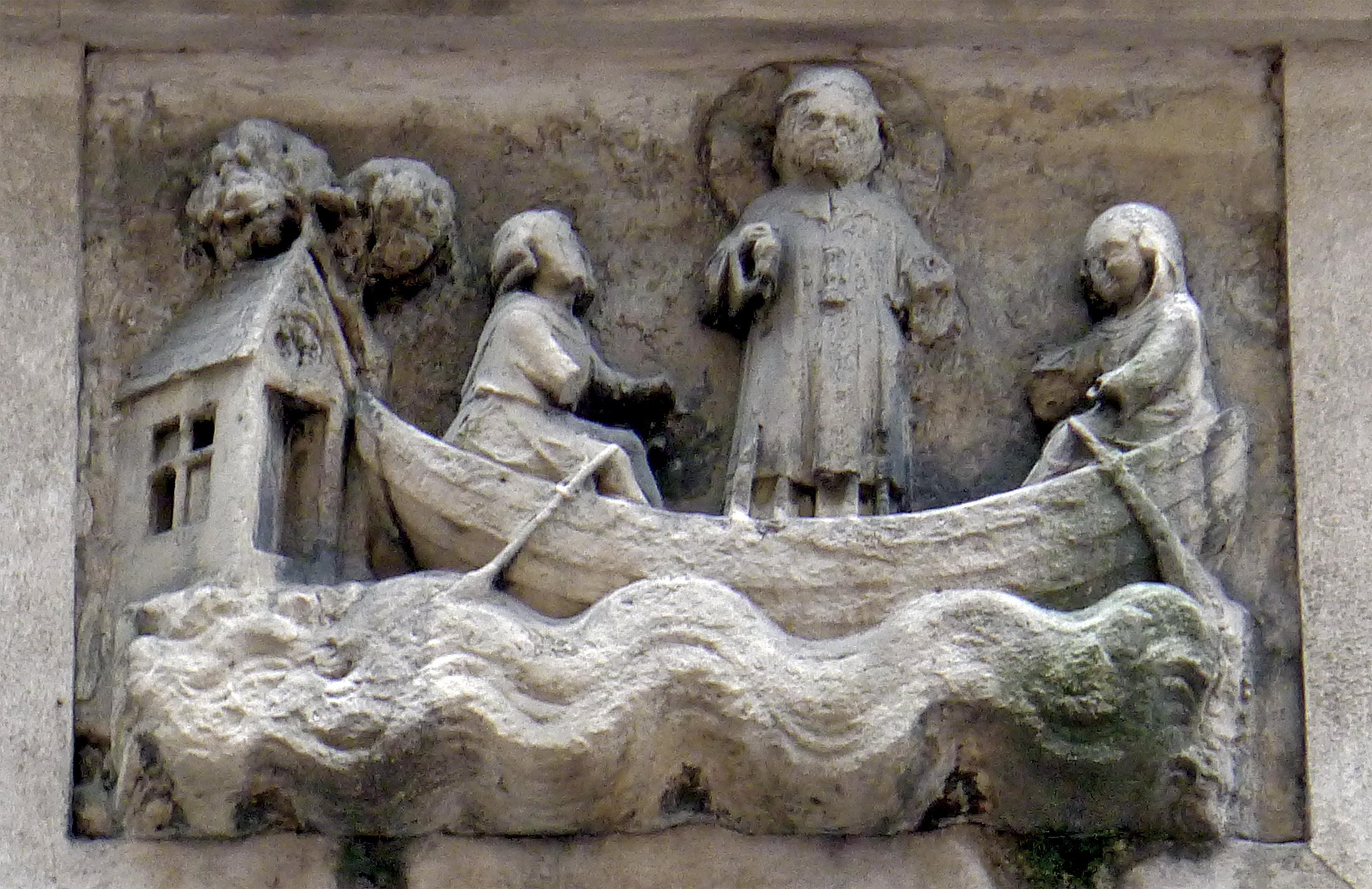 Rue Galande (n°42 détail : bas-relief ISMH) - Paris V Bas-relief, daté mentionné en 1380, représentant un épisode de la légende de Saint-Julien. .